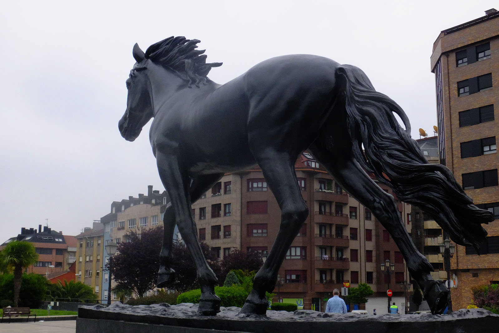 Oviedo